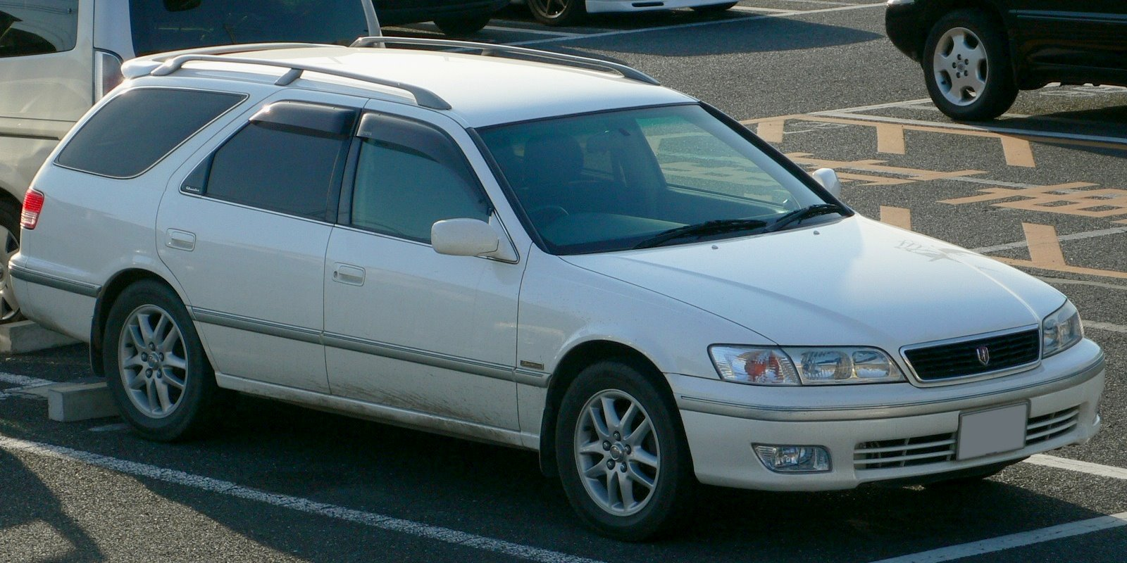 Toyota_Mark_II_Qualis(1999)